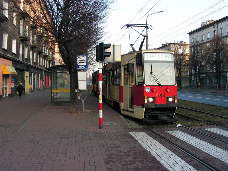 Tramwaj Konstal 105Na (#684) na alei Pokoju w Częstochowie.